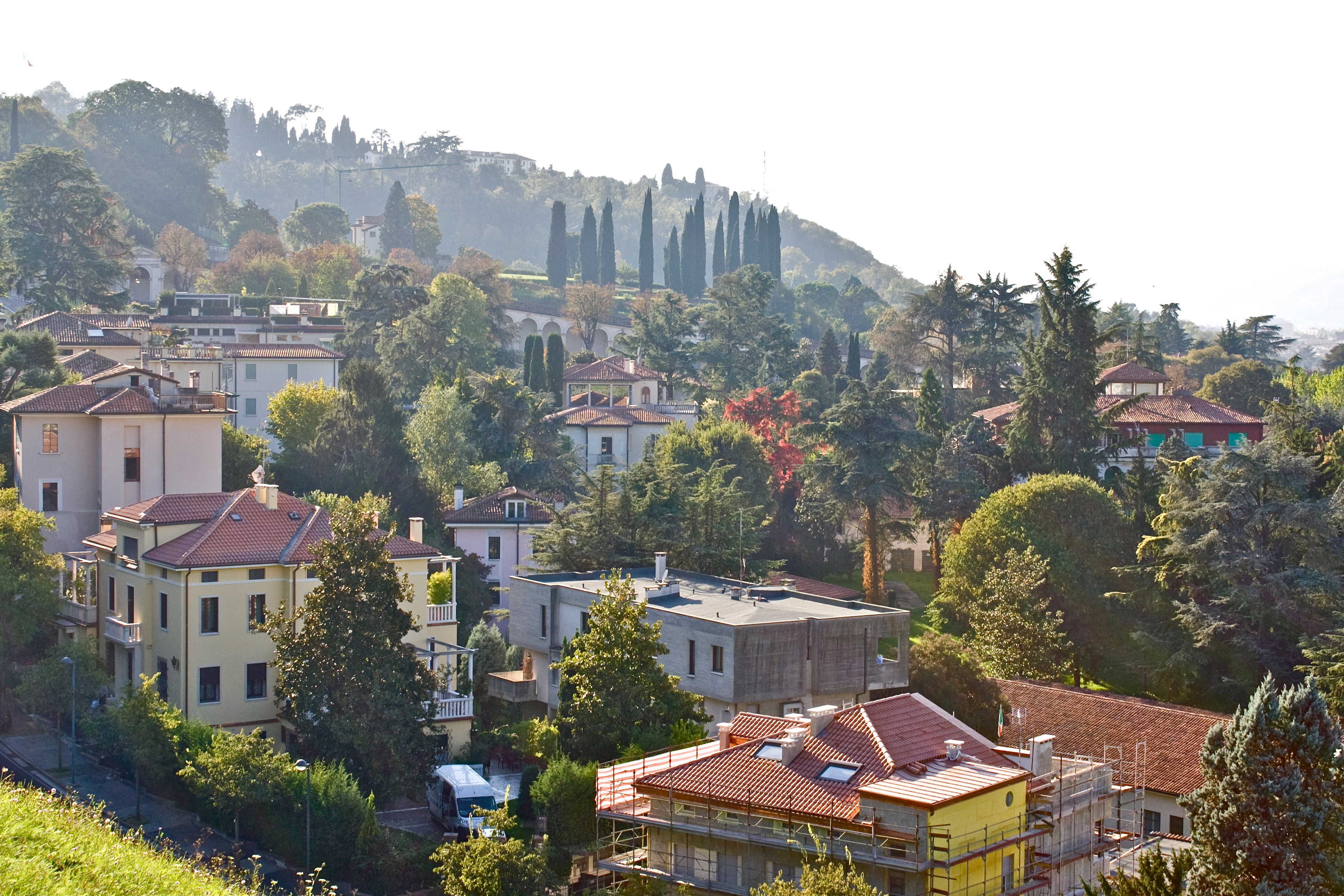 Vicenza - Monte Berico - Panorama della città